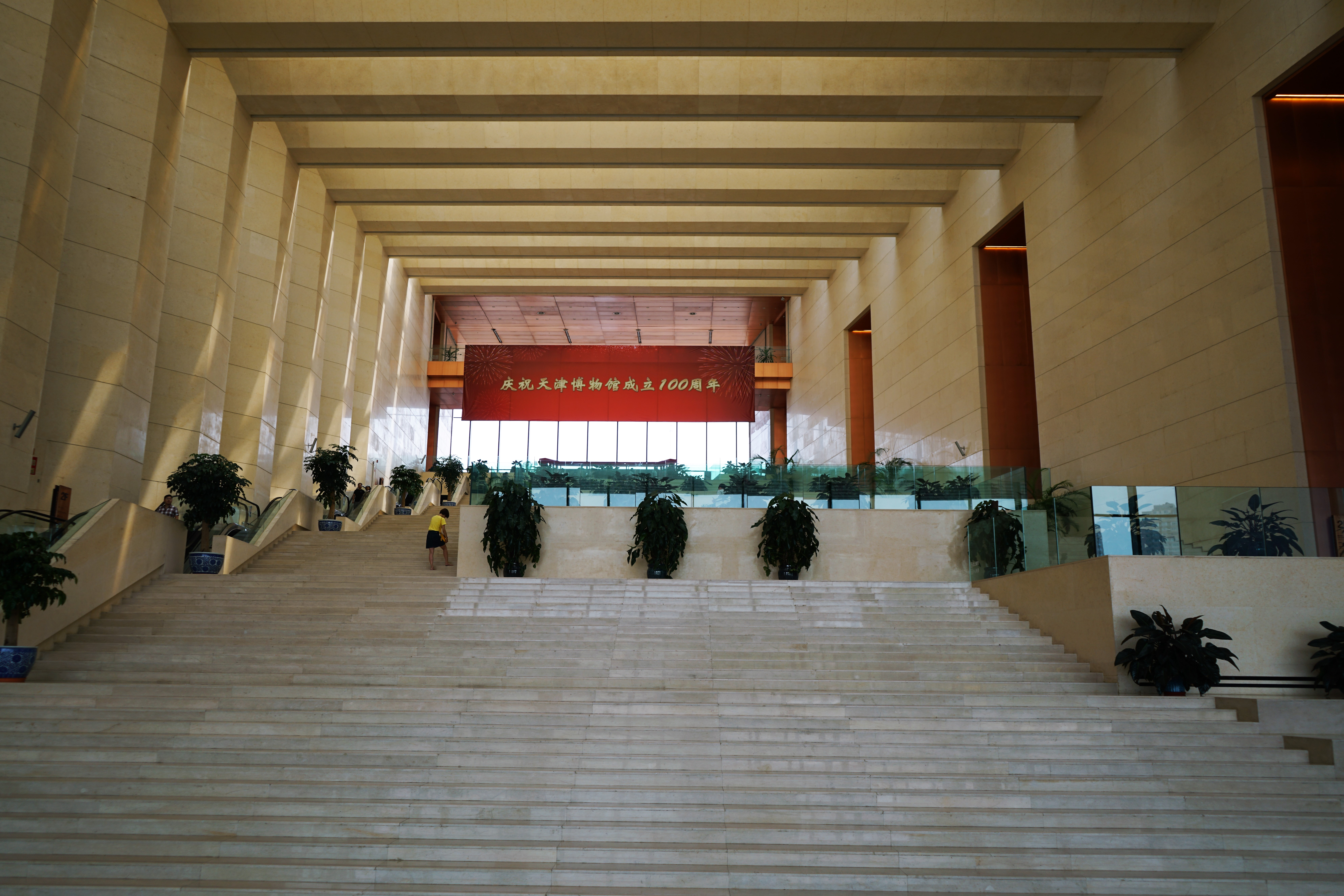 中文（中国大陆）: 天津博物馆大厅